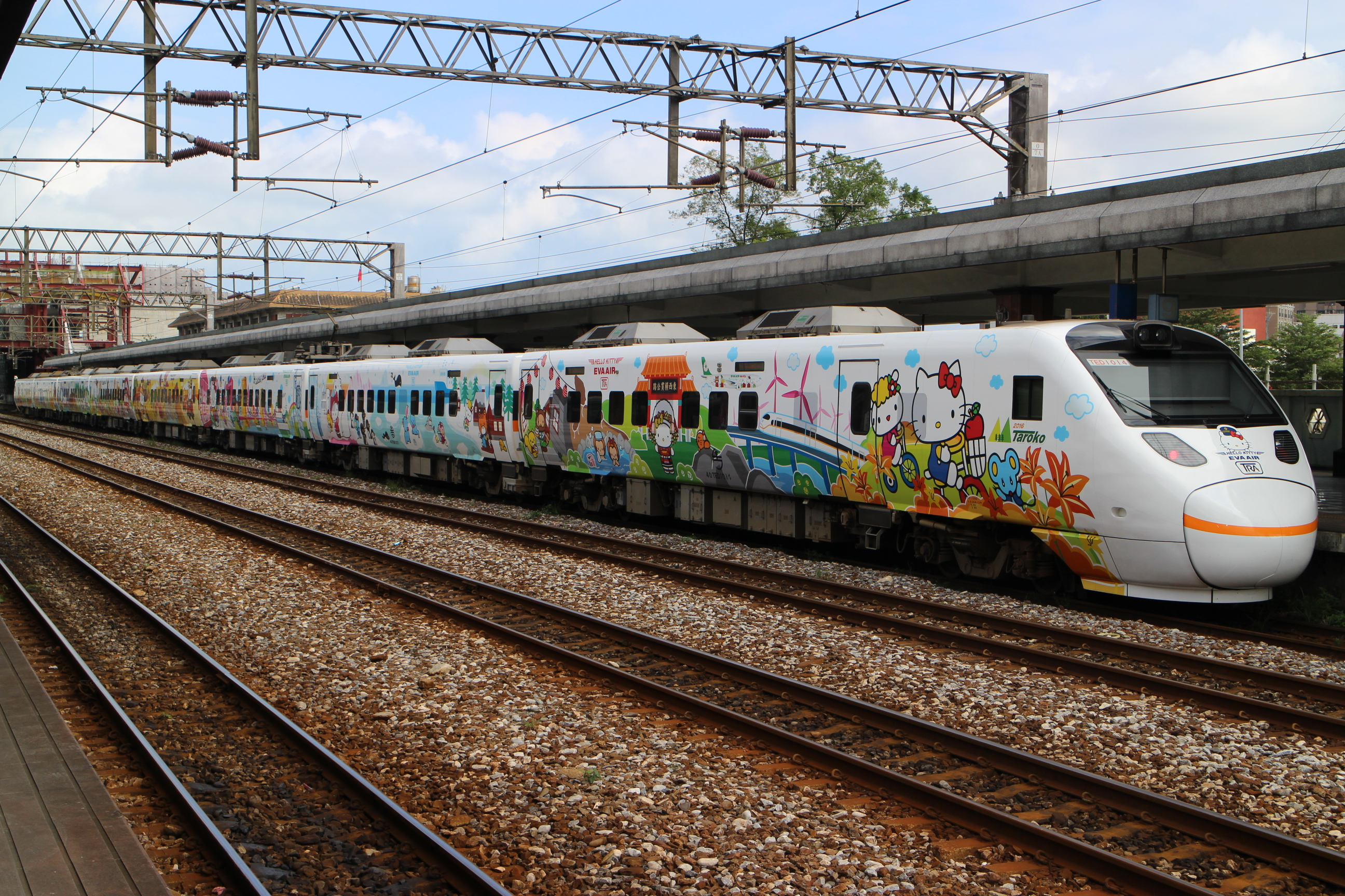 台湾鉄路管理局TEMU1000形電車（花蓮駅にて）